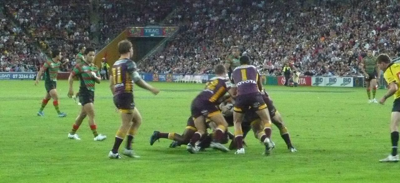 Broncos vs Rabbitohs 01